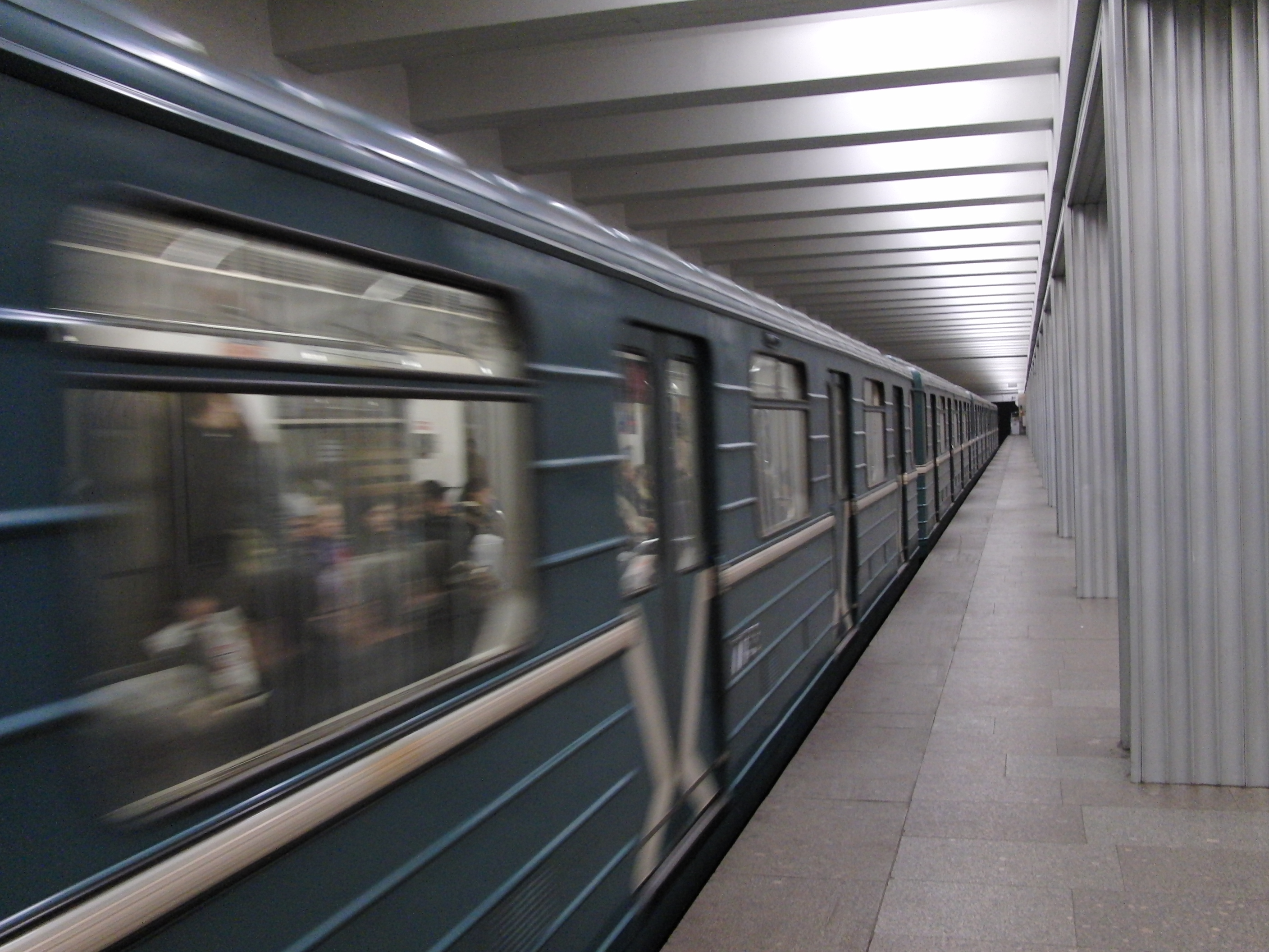 Nagornaya (Нагорная)